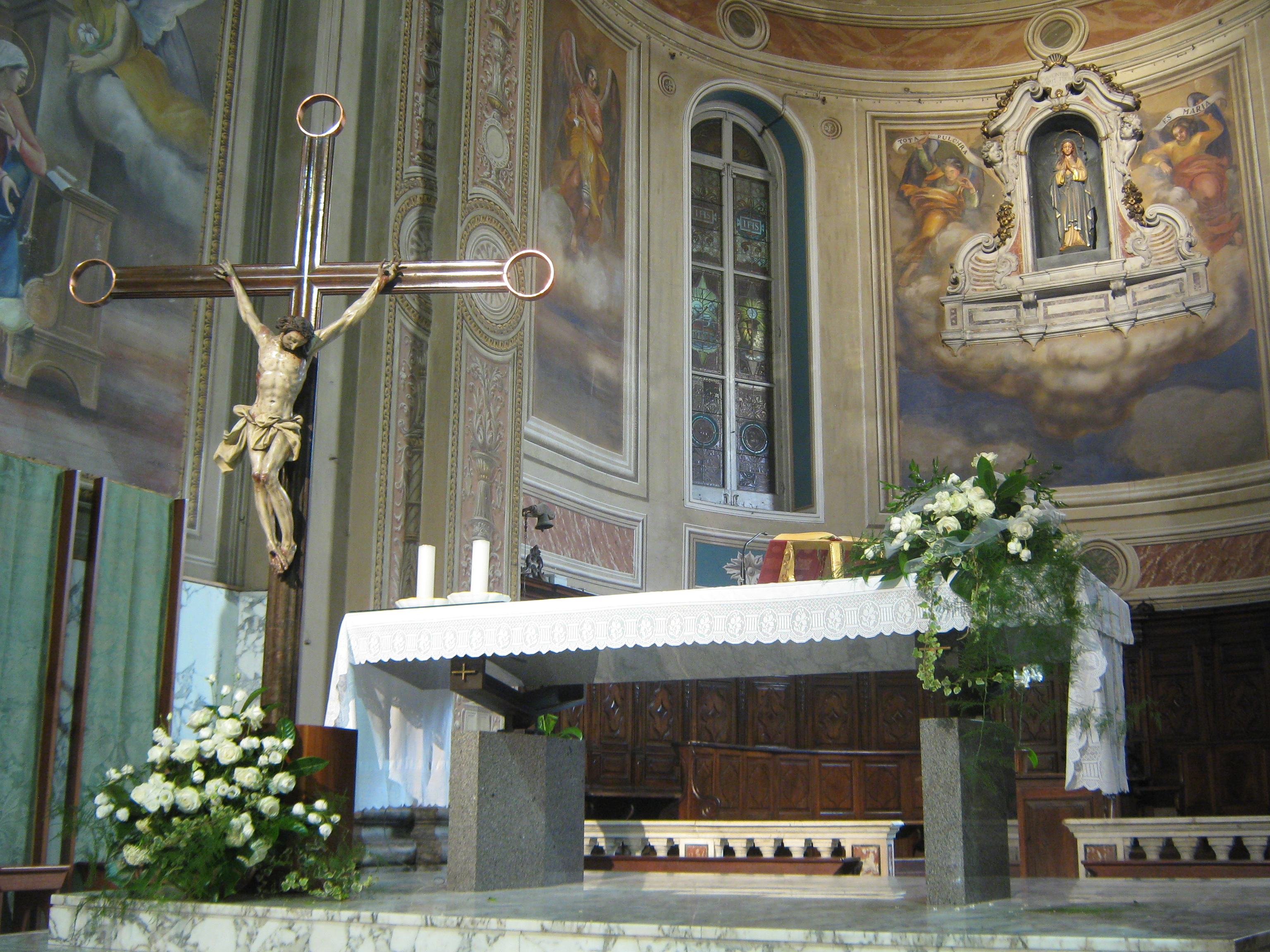 Interno della Chiesa di Santa Maria Maggiore di Cogoleto